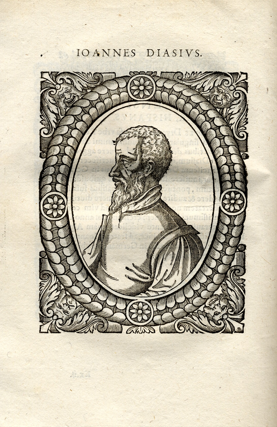 Ioannes Diasius (= Juan Díaz) Holzschnitt in: Théodore de Bèze: Icones. - Genf, 1580.